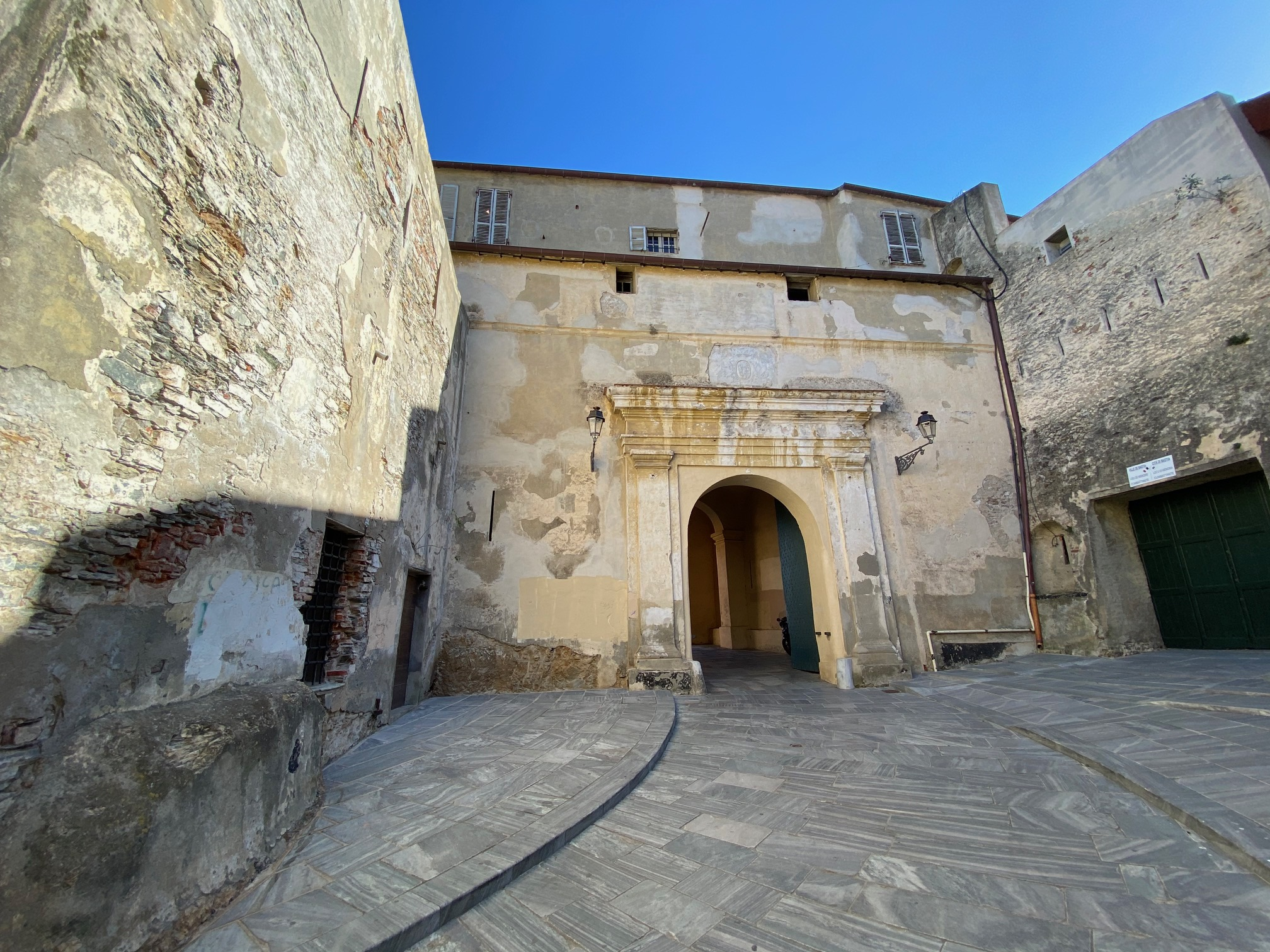 Corsu: A segonda porta di a citatella di Bastia, u locu si chjama "E Loghje"